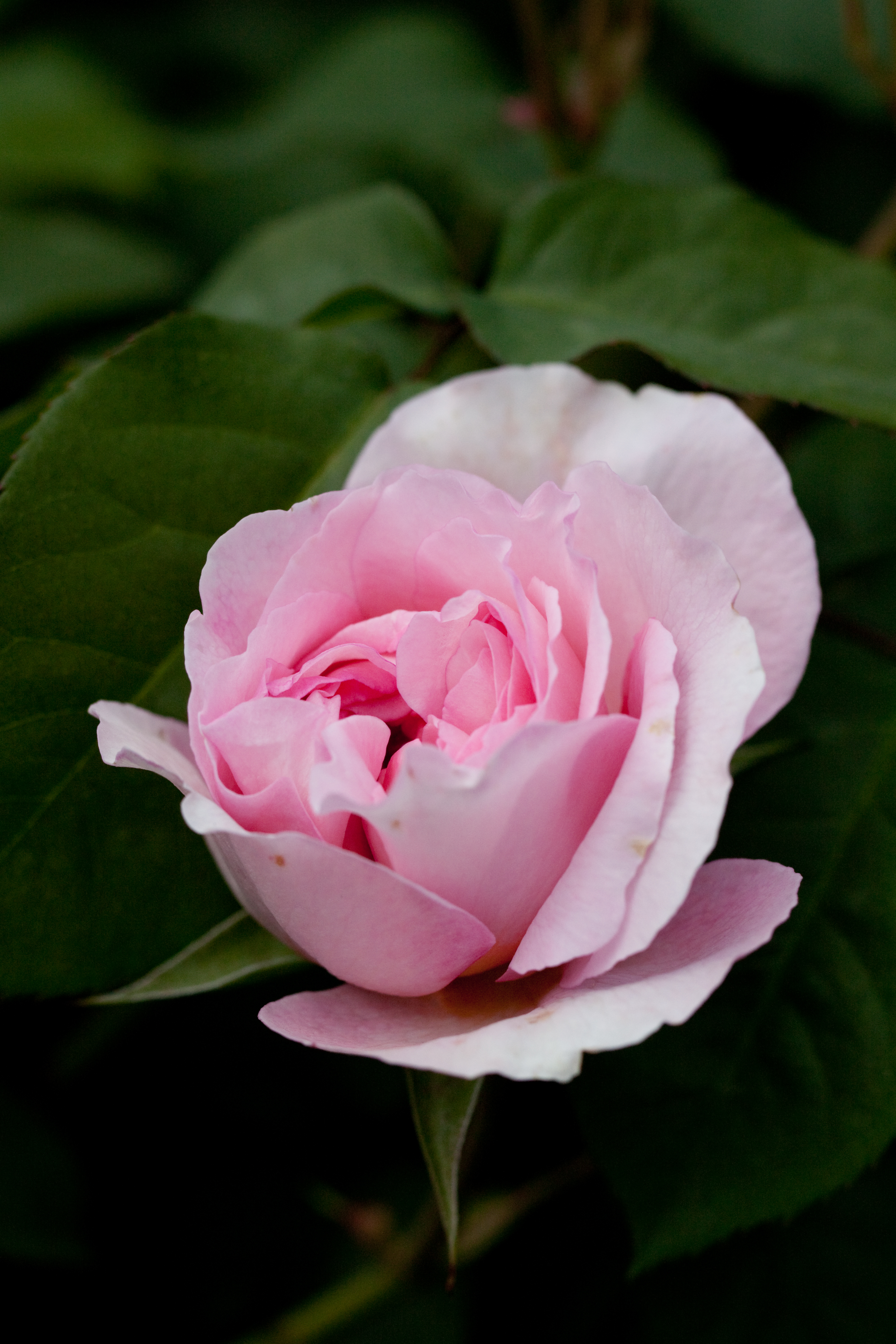 Radio Times. ラジオタイムス。